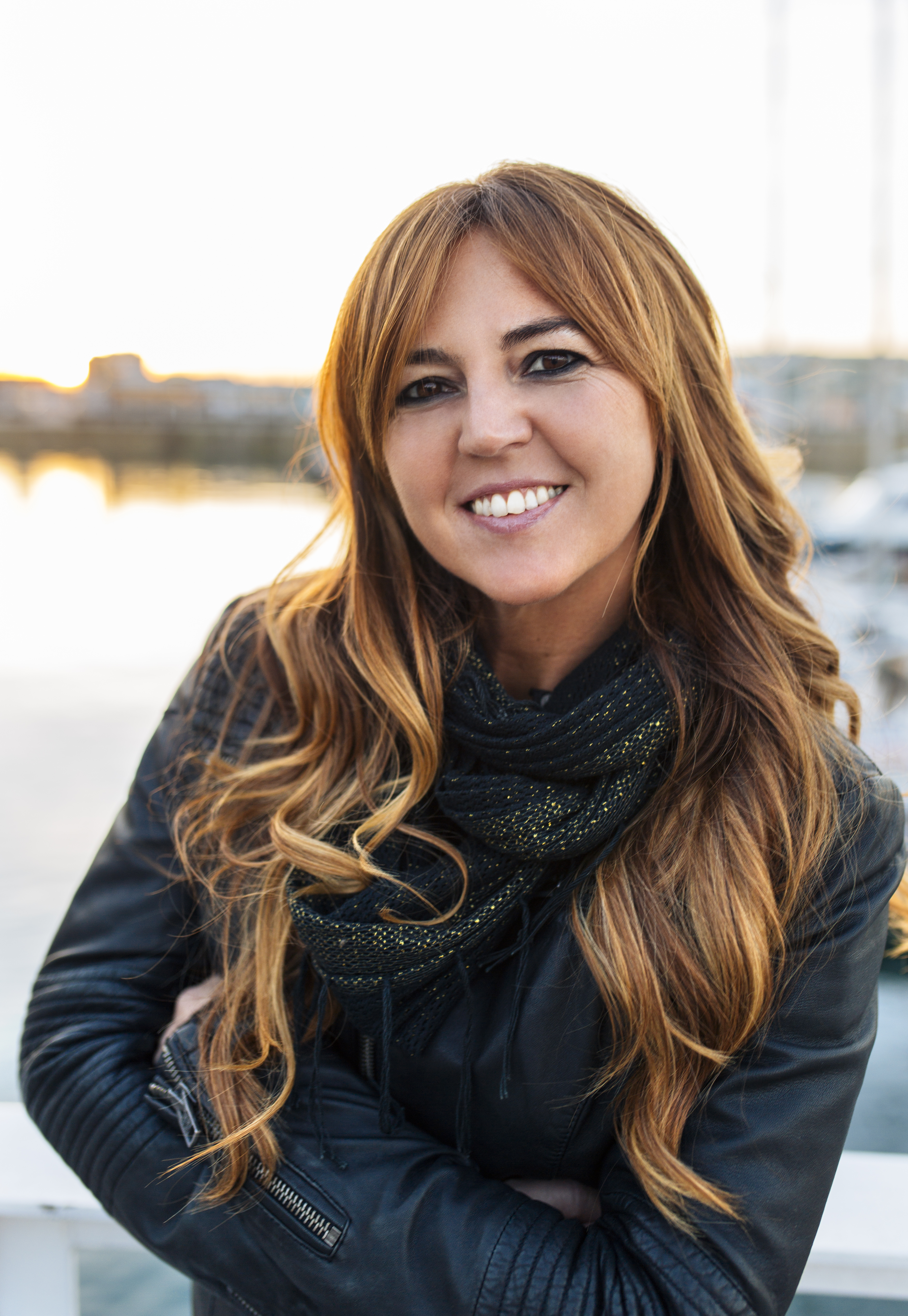 Foto personal